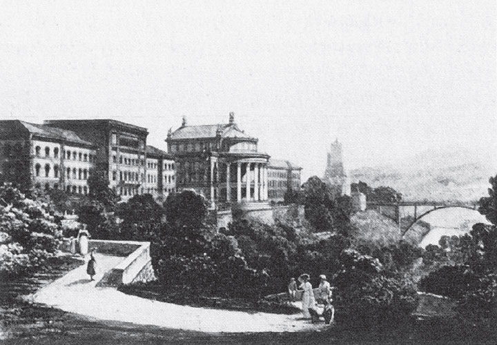 Wettbewerbsprojekt von Alfred Friedrich Bluntschli (Zürich) für ein Eidgenössisches Parlaments- und Verwaltungsgebäude in Bern. Ansicht von der Kleinen Schanze. Aquarell von Julius Stadler (Zürich).